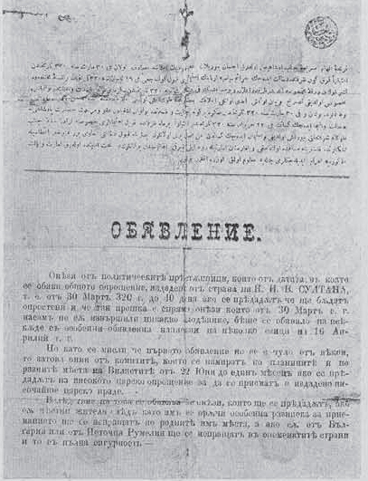 Ottoman_document_for_bulgarian_revolutionaries_in_Macedonia